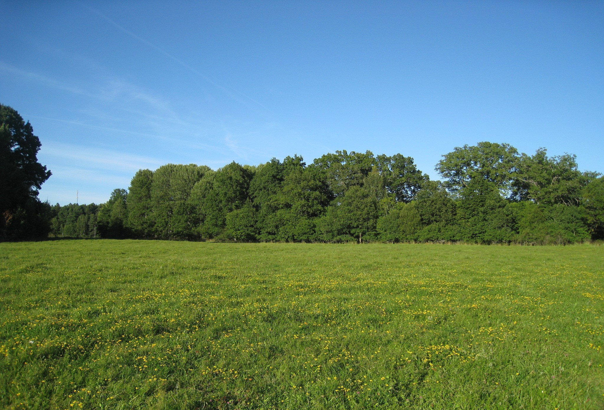 Läsidesmoränen vid Högby, Viksjö, Järfälla, Stockholms län.